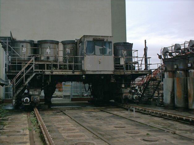 Beschickungswagen einer stillgelegten Koksofenbatterie der Kokerei Zollverein, Essen